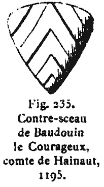 Contre-Sceau de Baudouin V de Hainaut / Seal of Baudouin V de Hainaut 1193